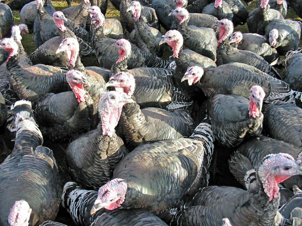 Élevage de dindes (Richebourg-Yvelines) Photo JH Mora, novembre 2005